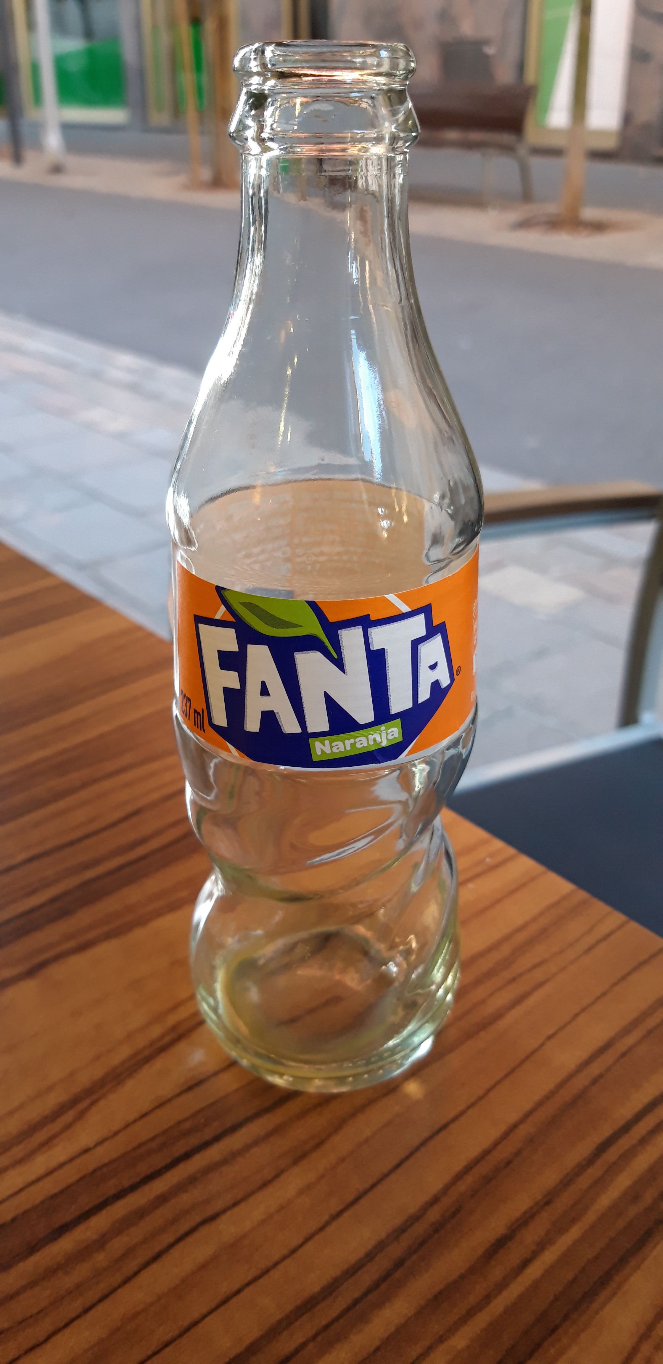 Botella de Fanta Naranja vacía